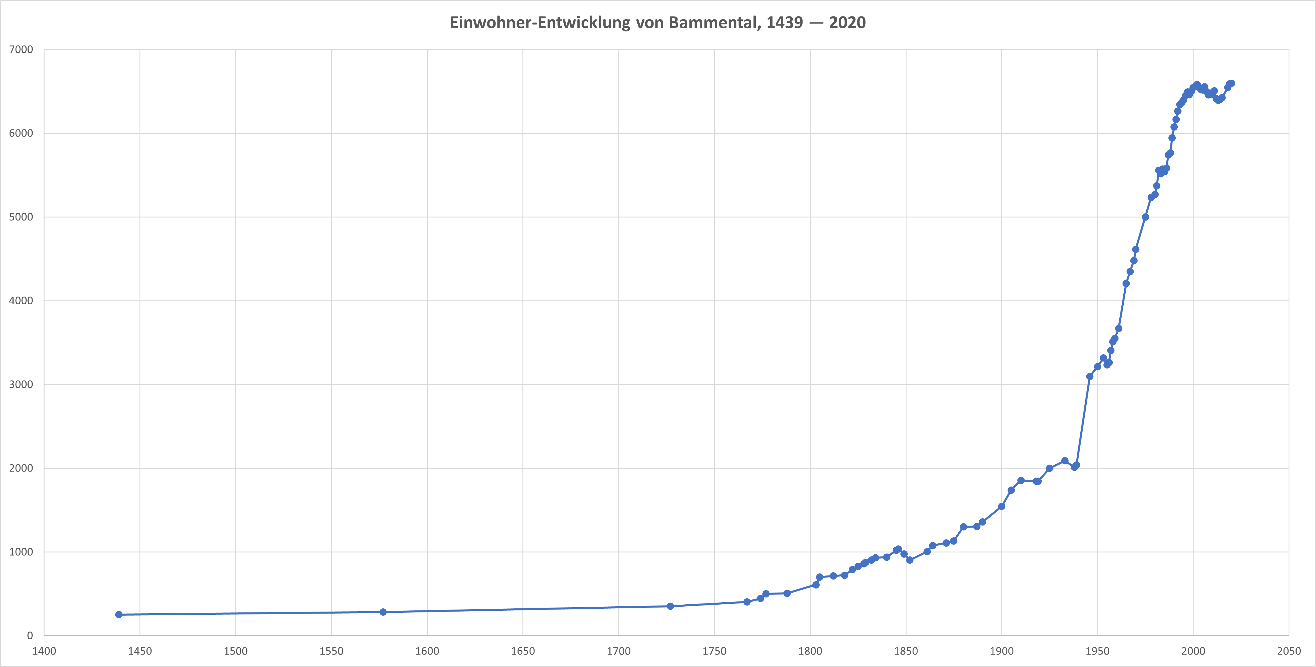 Einwohnerentwicklung von Bammental